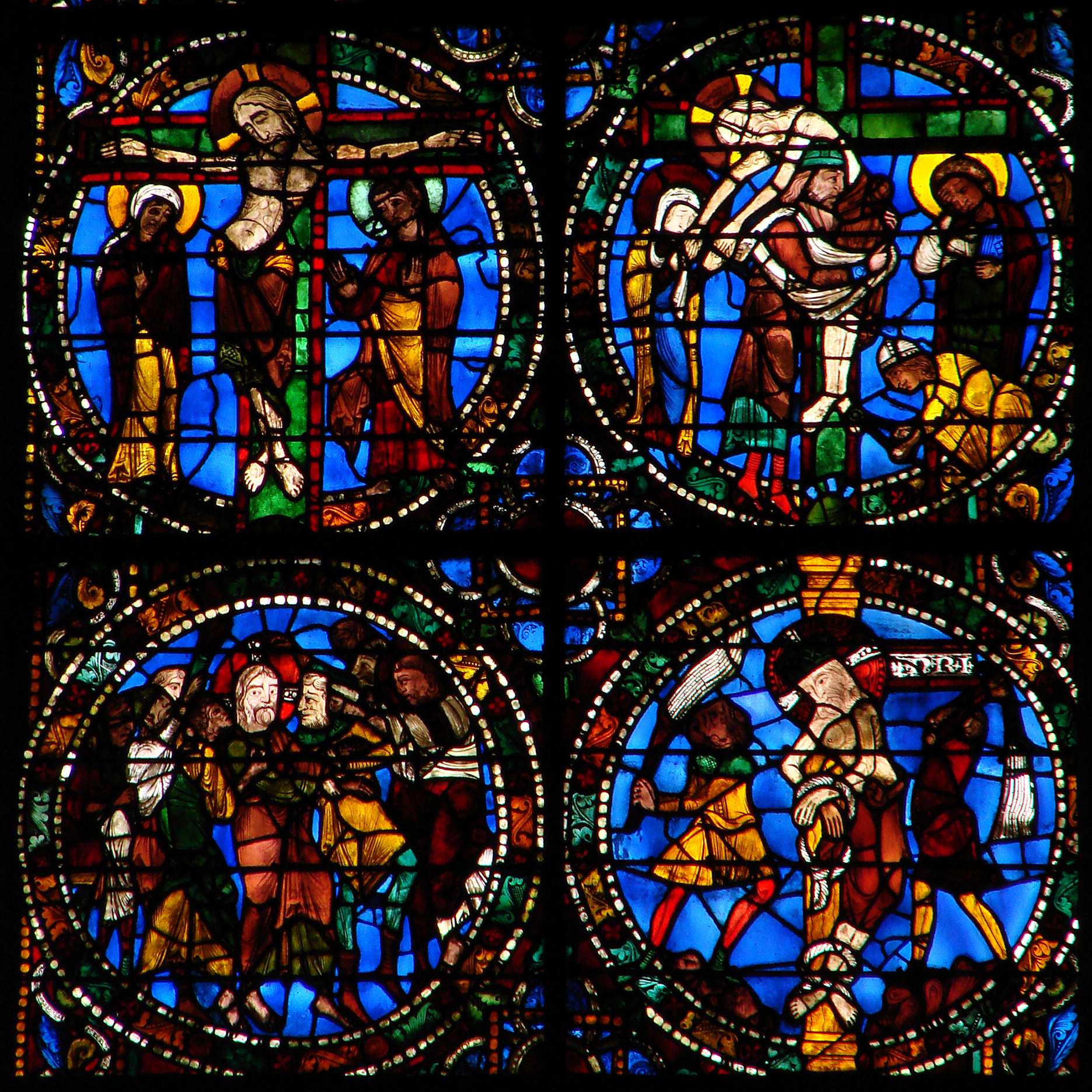 Détail d'un vitrail de la cathédrale Notre-Dame de Chartres (façade): la Passion.